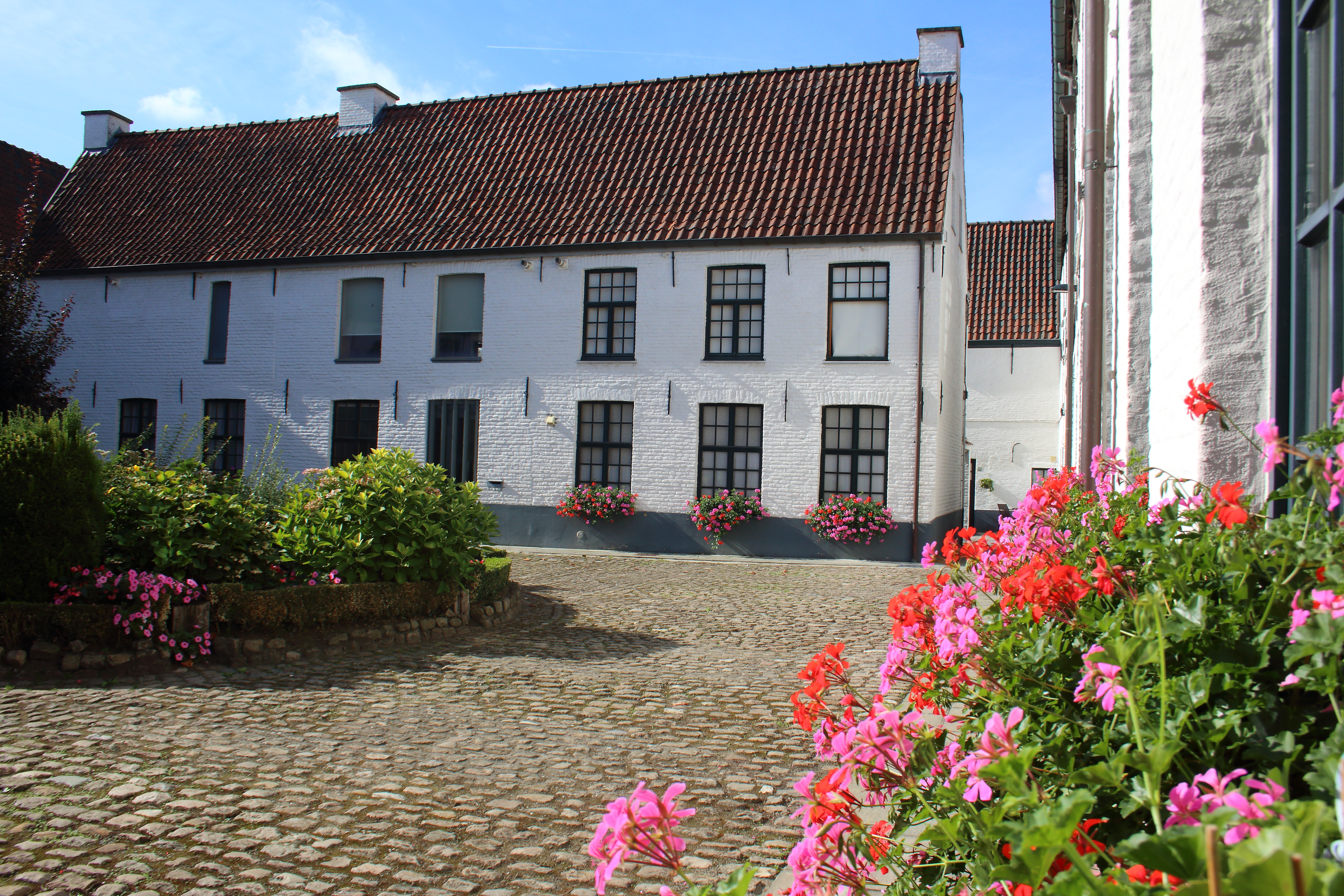 Begijnhof, Oudenaarde, Vlaanderen, België